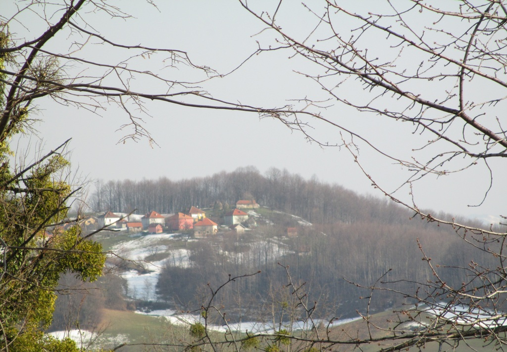 naselja Lipovice kod Kalesije